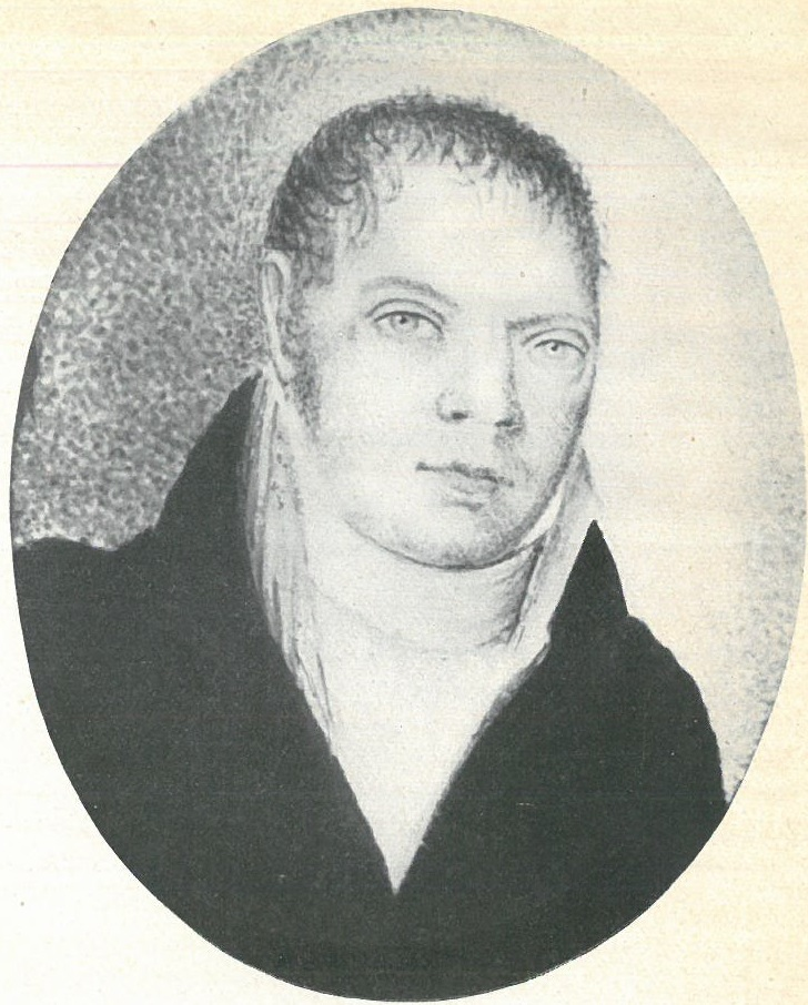 Johann Joseph Schneider (* 15. Oktober 1777 in Fulda; † 24. September 1854 ebenda) war ein deutscher Arzt und Regionalhistoriker.